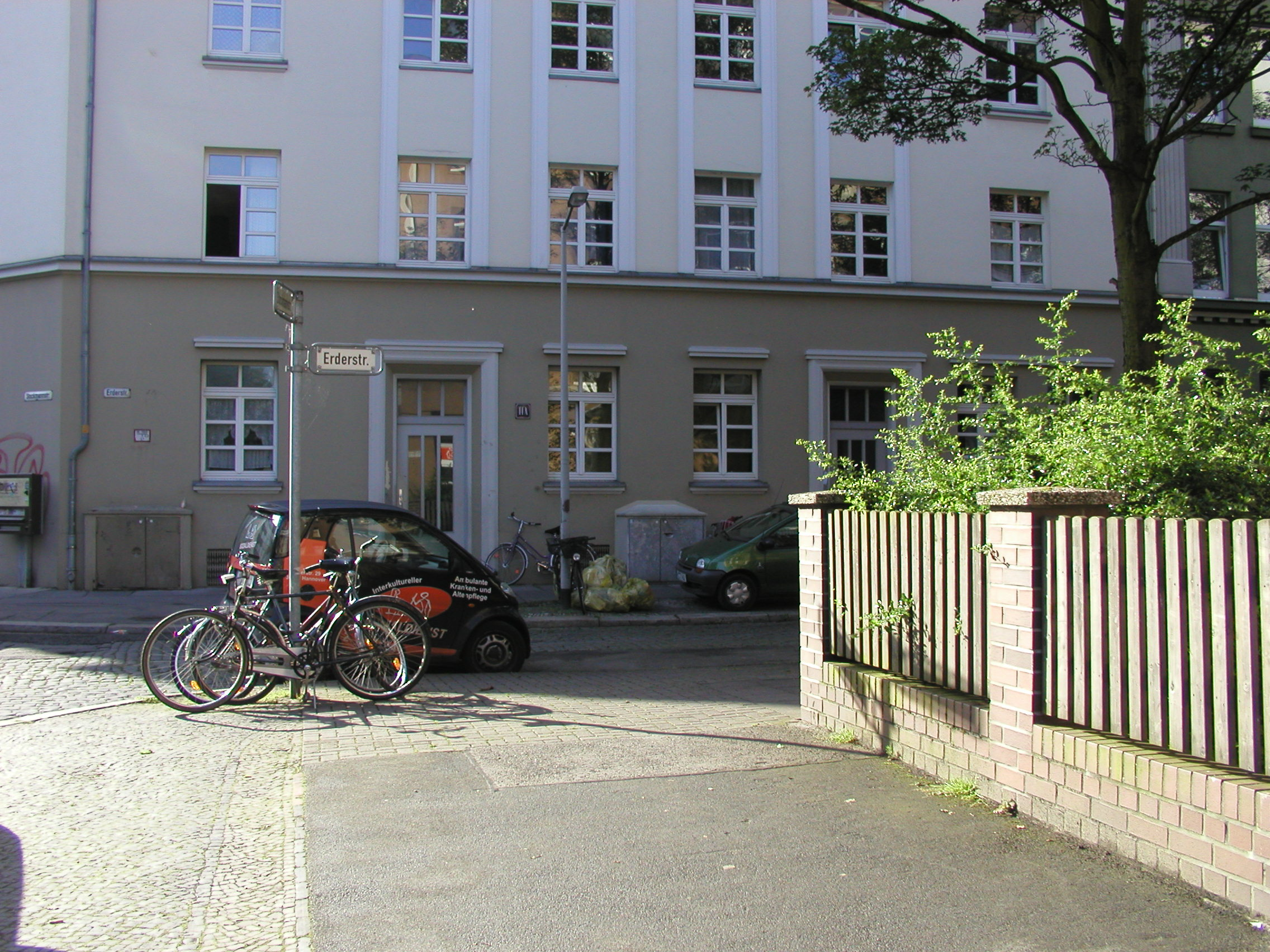 Erderstraße